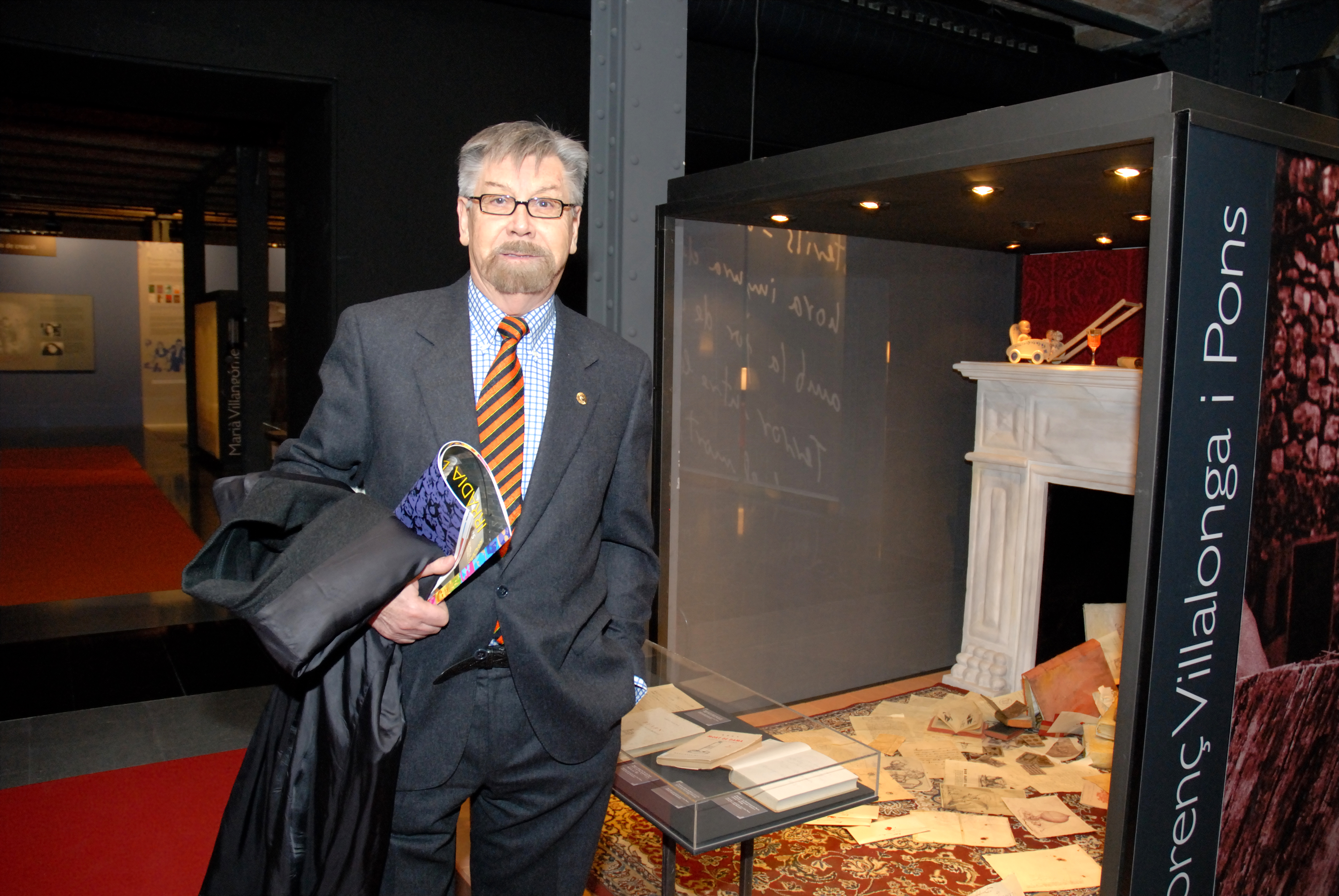 Baltasar Porcel al MHC el 2006.